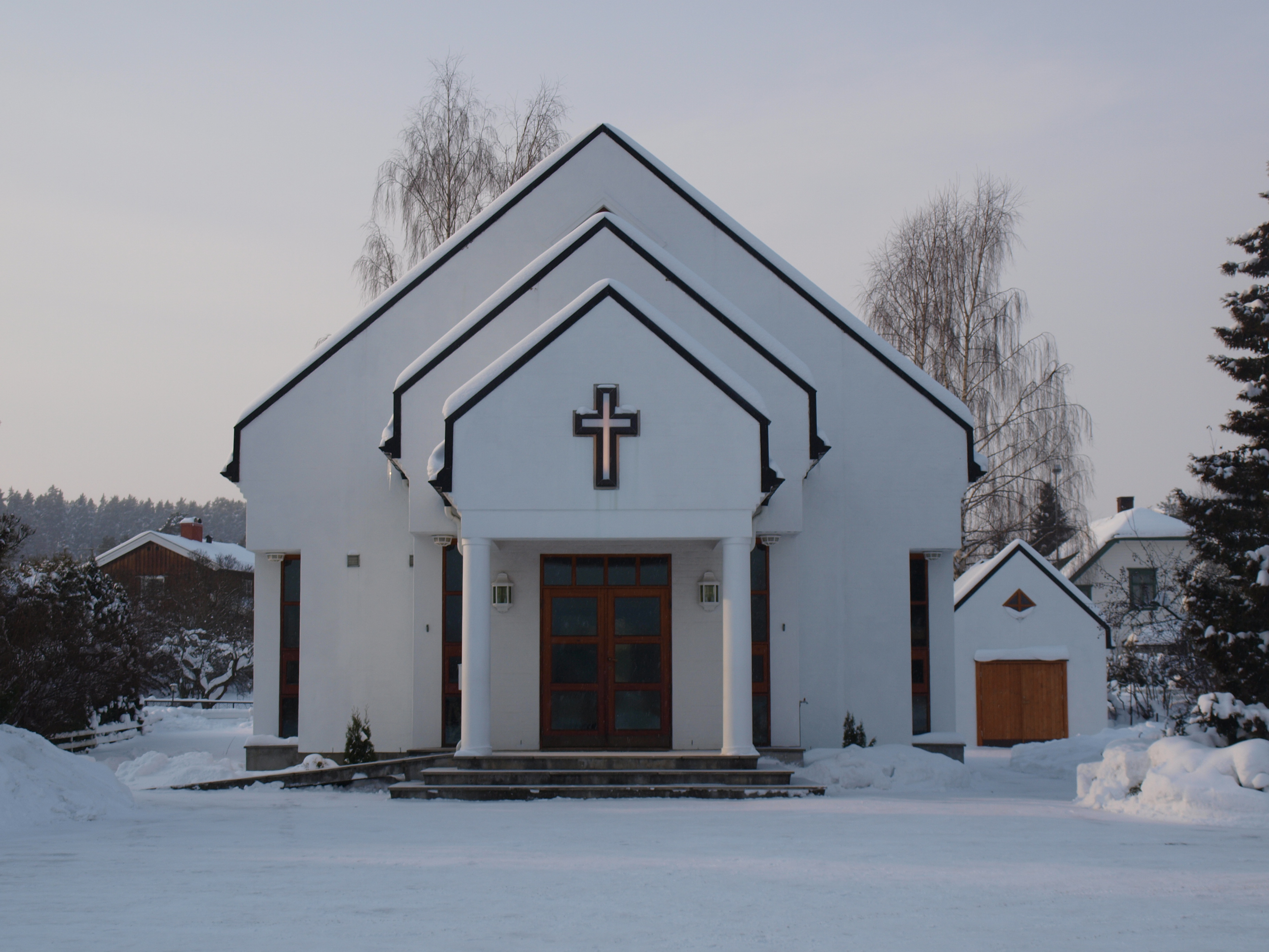 Adventkirken Hønefoss (Syvendedags Adventistsamfunnet). Kirken ligger i Telegrafalleen 3 i Hønefoss.